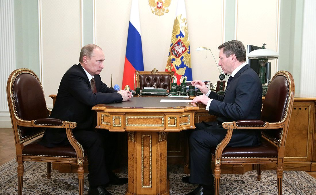 Президент России Владимир Путин с губернатором Липецкой области Олегом Королёвым